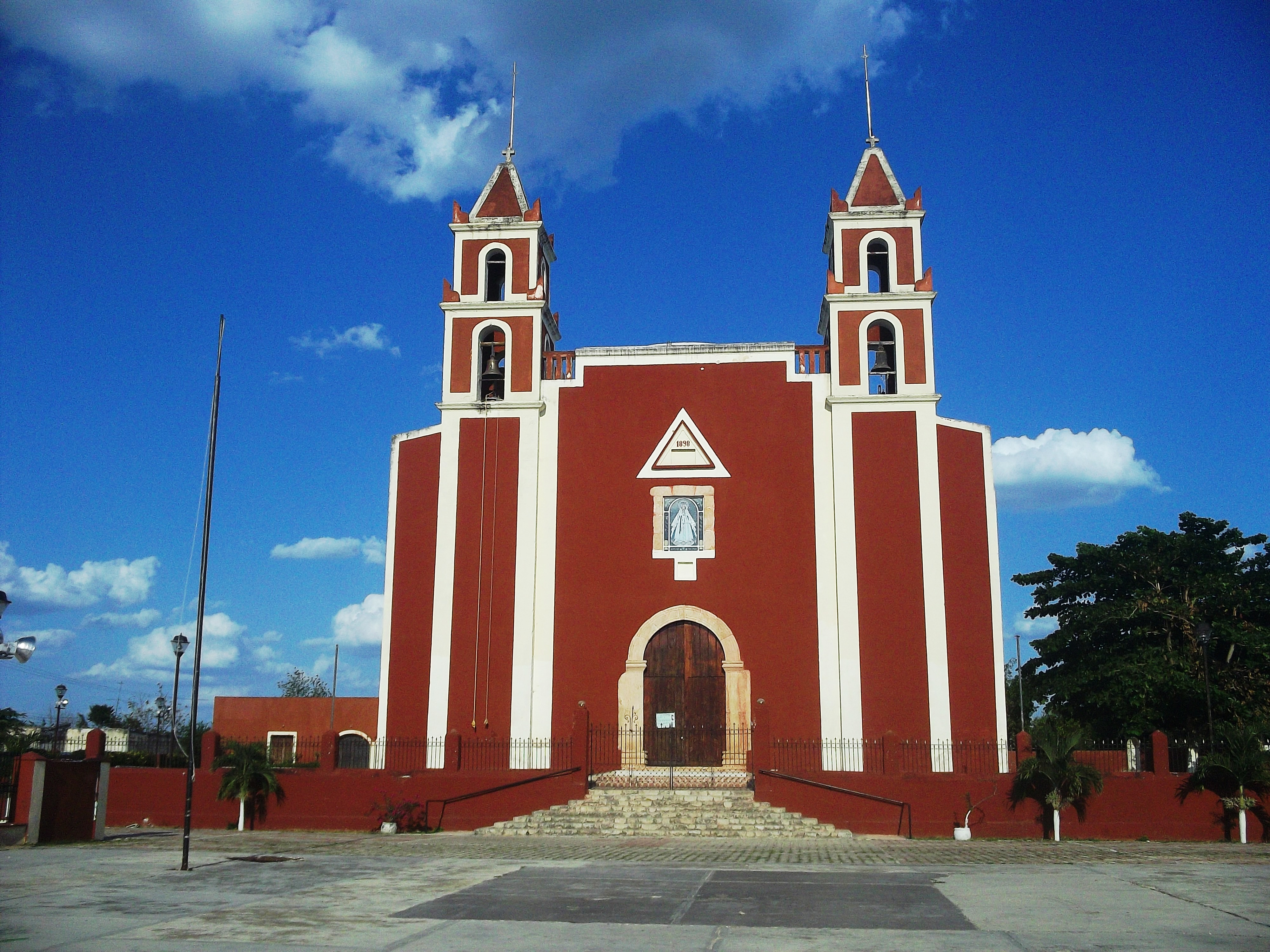 Iglesia de Baca, Yucatán.